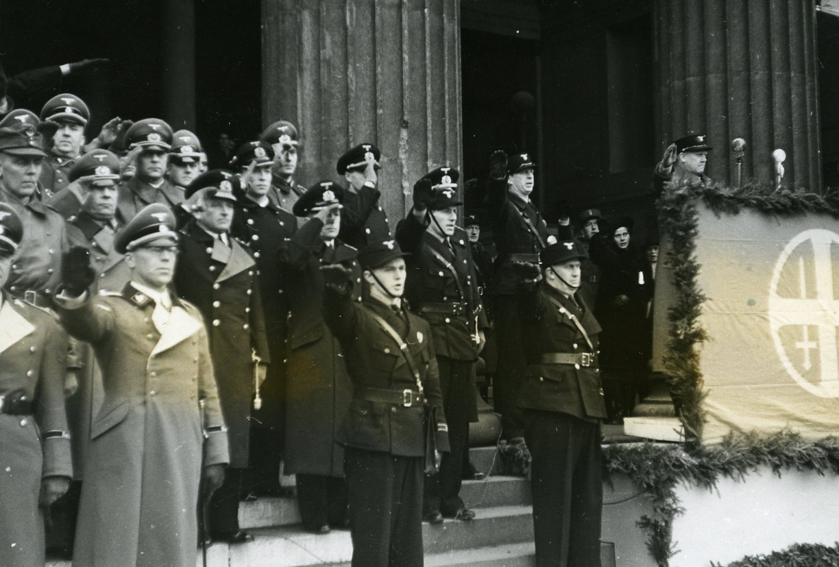 1941/11/01. RA/RAFA-3309/U 38B/9/38-9-12 img140